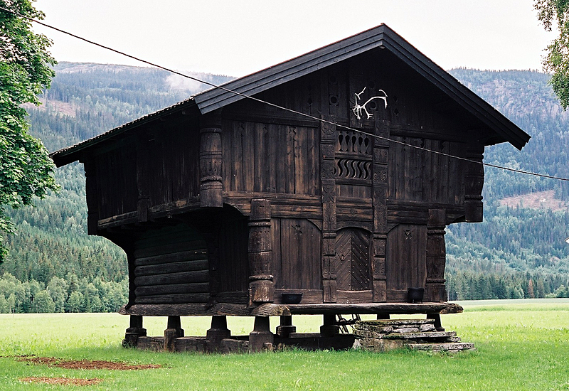 Loft, Søre Stærnes, Rollag, Buskerud. Bygd 1725. Freda 1923.